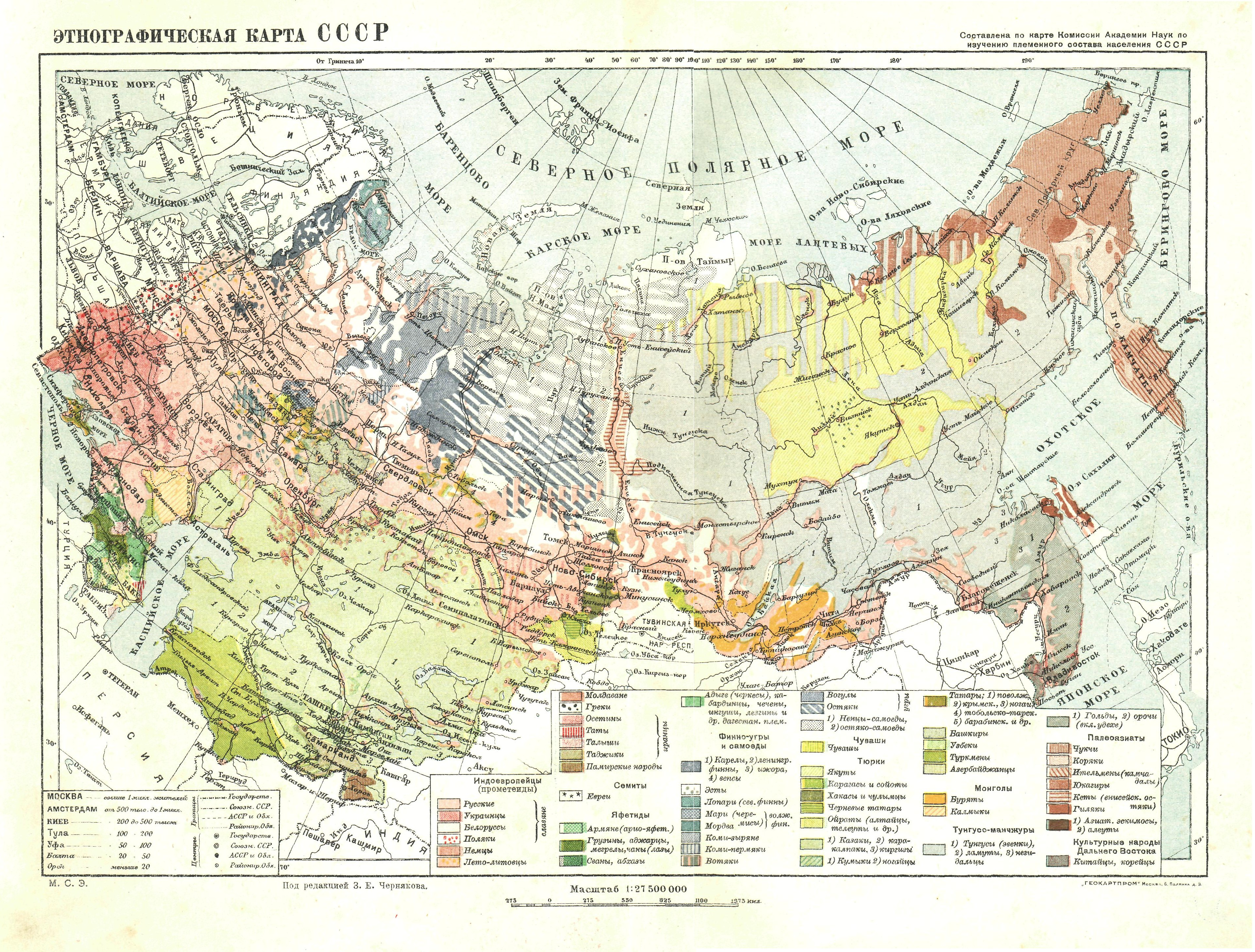 Етнографічна карта СРСР масштабу 1:27 500 000